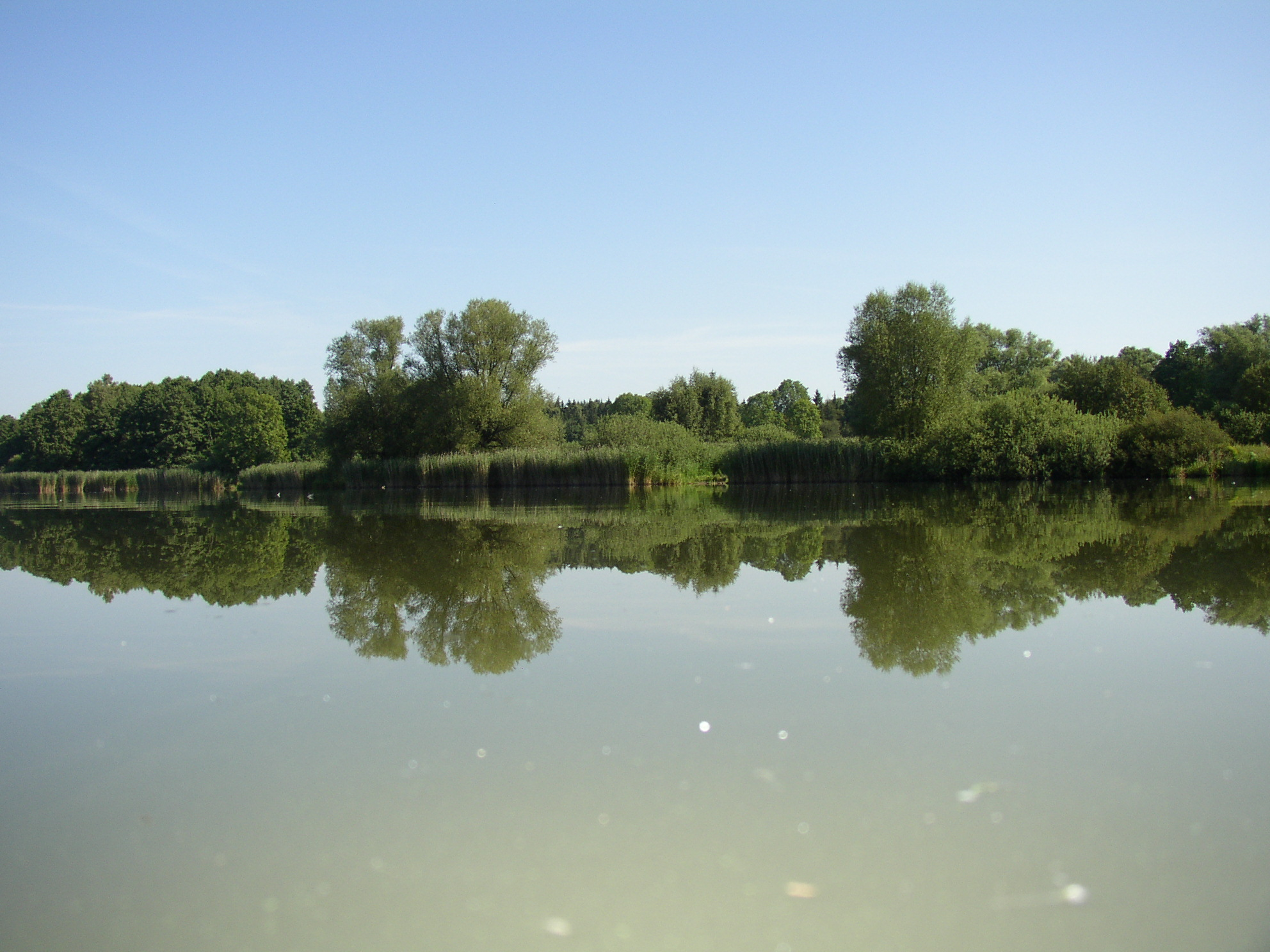 Břeh rybníka Světlík s rákosím